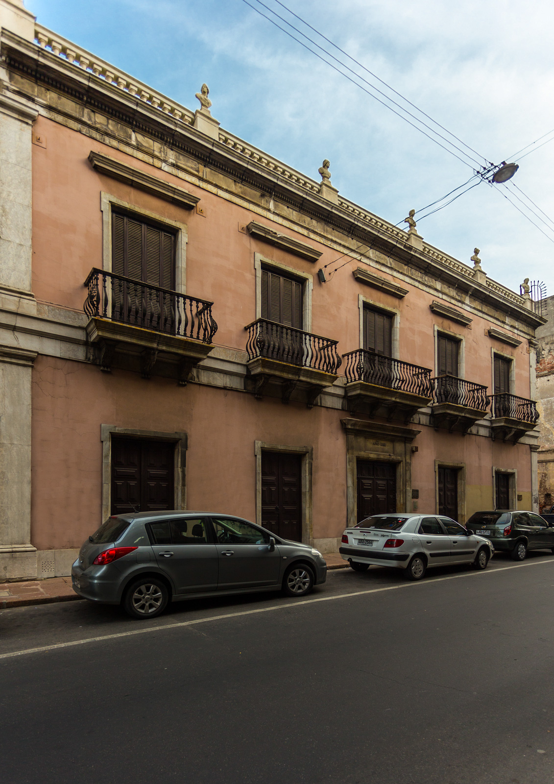 Casa de don Antonio Montero - Museo Histórico Nacional. Ubicada en el departamento de Montevideo